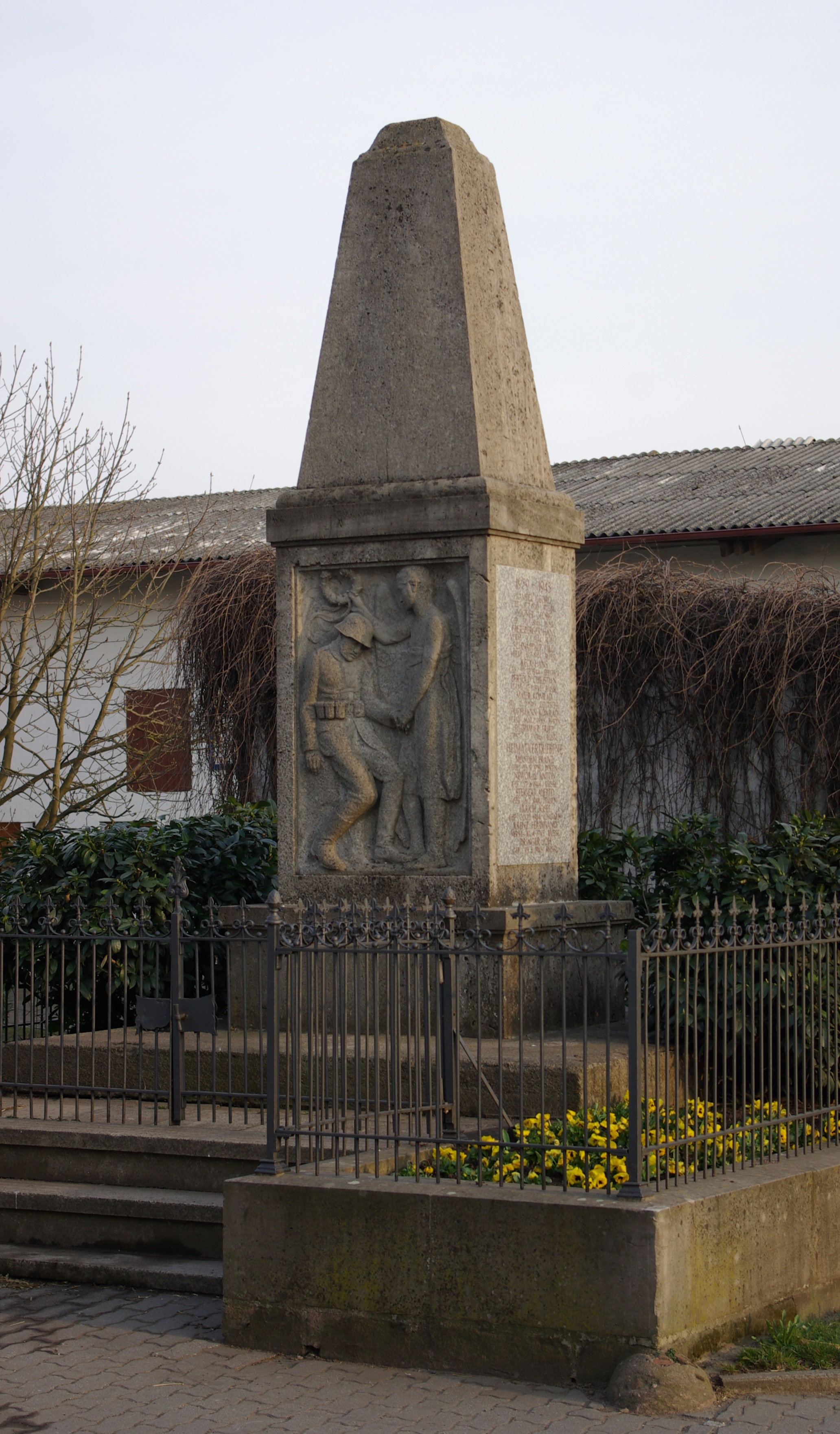 Kriegerdenkmal in Hüttendorf (Erlangen). Das Denkmal wurde von dem Frauenauracher Bildhauer Karl May geschaffen.